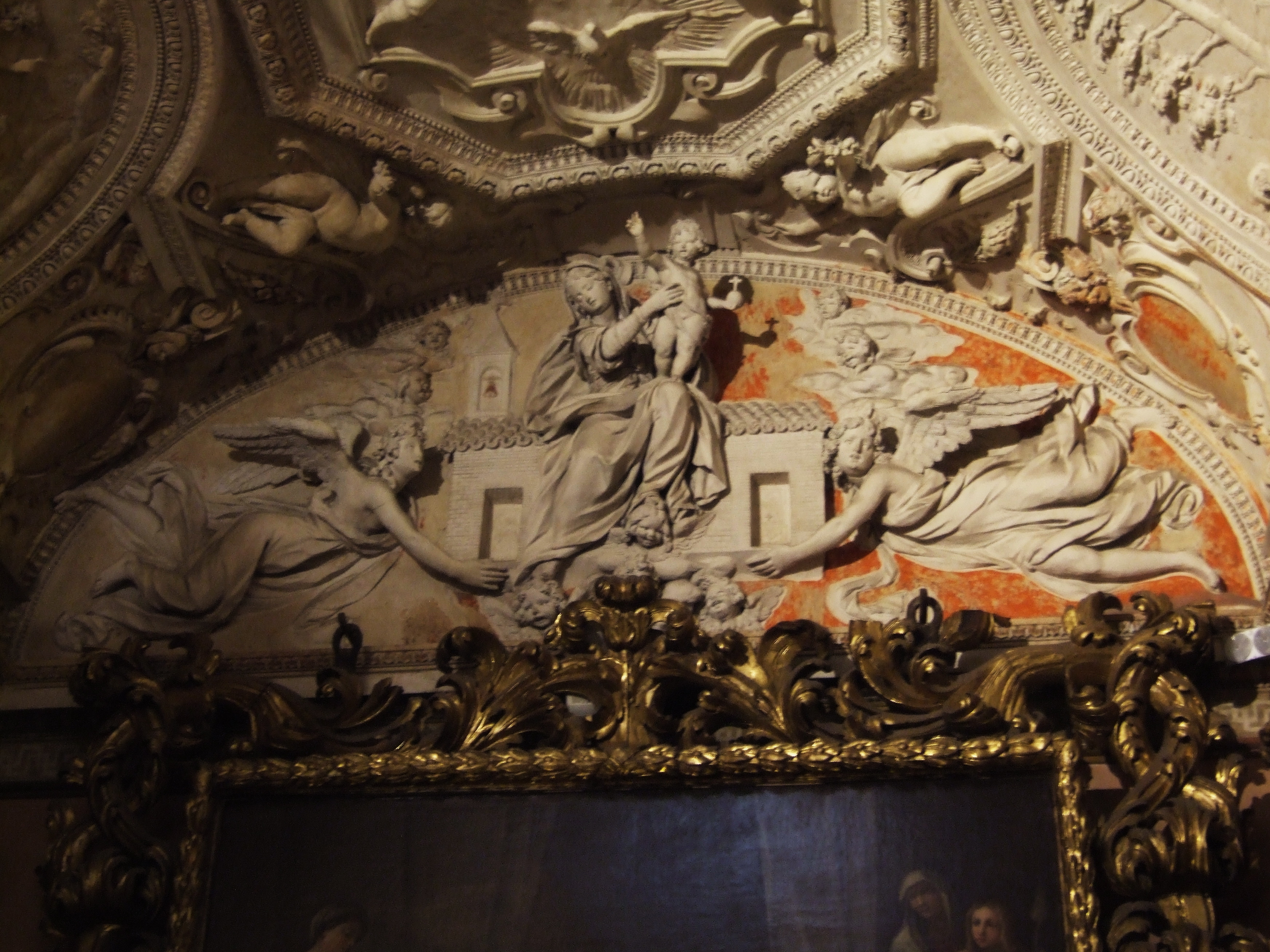 Loreto - Atrio della sacrestia - Stucco con la Traslazione della Santa Casa - opera di Francesco Selva